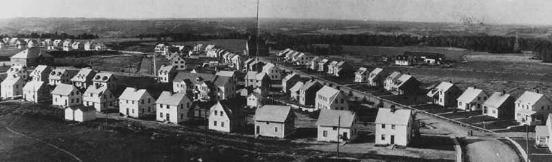 La ville d'Arvida, dans la région du Saguenay.